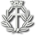 Fregio cappellani militari, esercito italiano